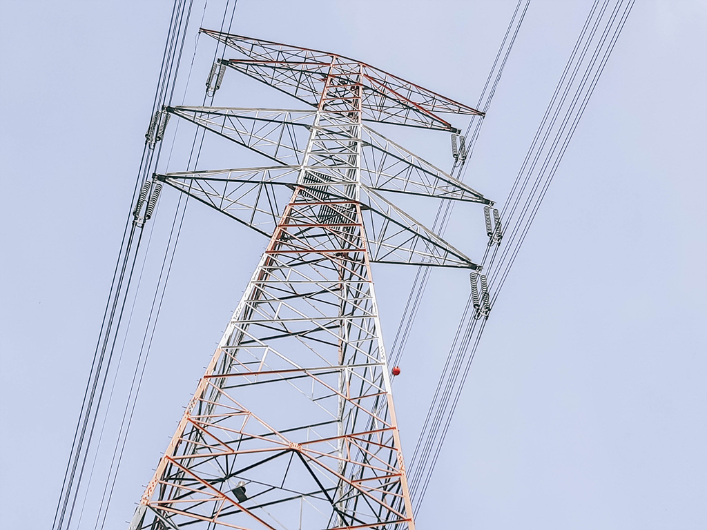 대한민국의 송전탑